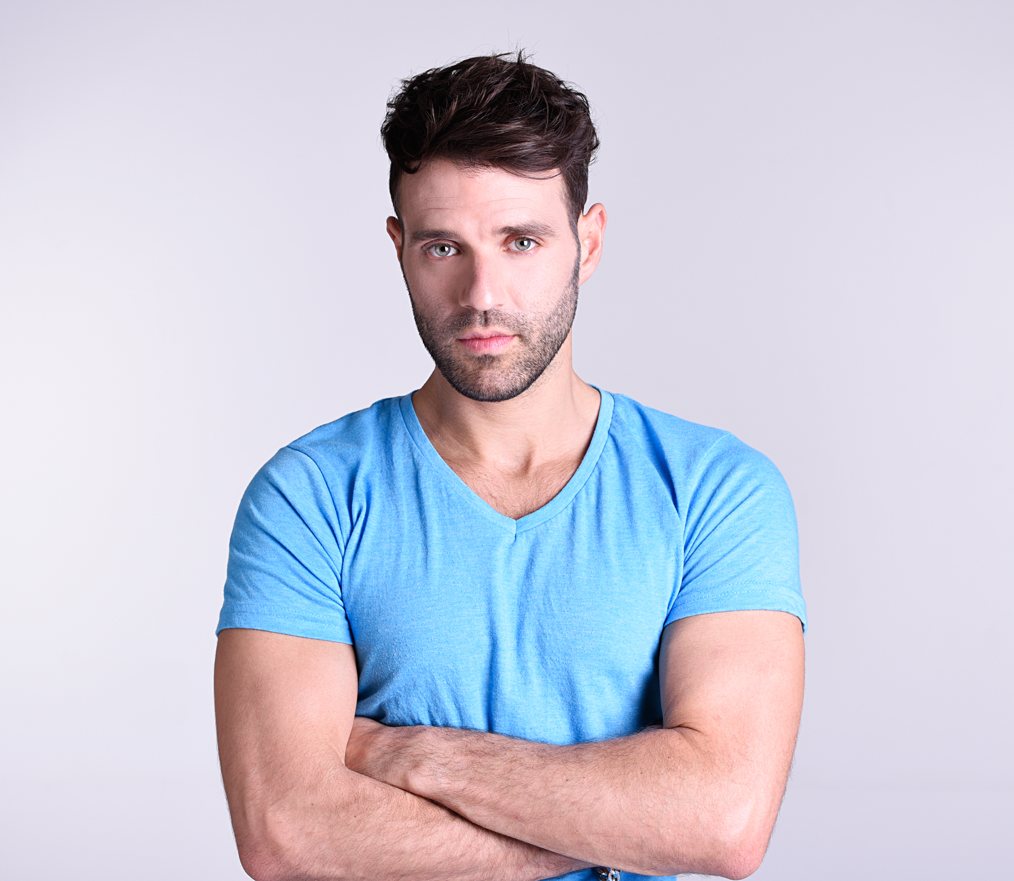 נעם חורב